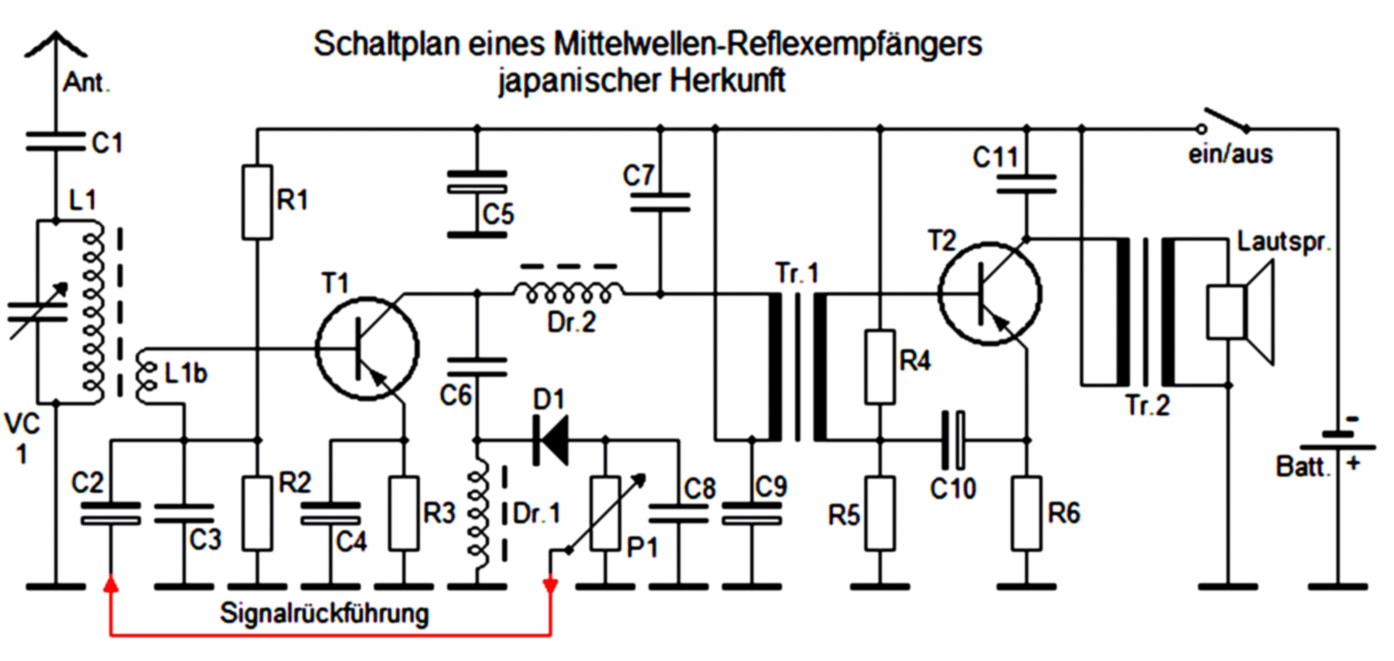 Schaltplan